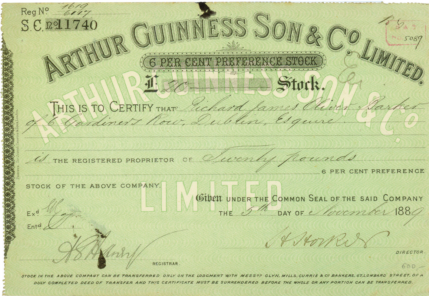 Arthur Guinness Son & Co. Limited, 6 % Preference Stock über £ 20 vom 05.11.1889